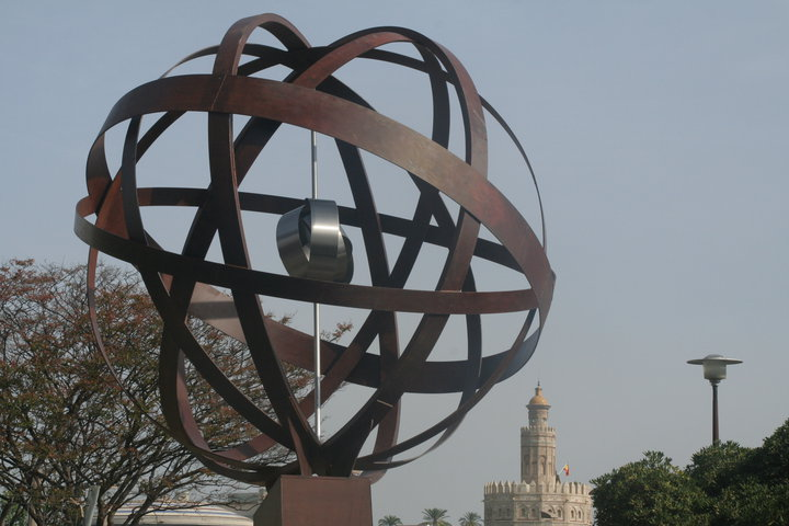 Esfera armilar instalada en el entorno desde donde partió la Expedición de Magallanes-Elcano que realizó la primera circunnavegación de la Tierra.